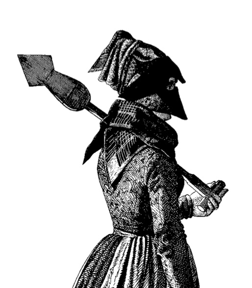 Arbejdskvinde fra Fanø med redskab og strude, tegnet af F. C. Lund, Illustreret Tidende, Nr. 53, 30/09-1860